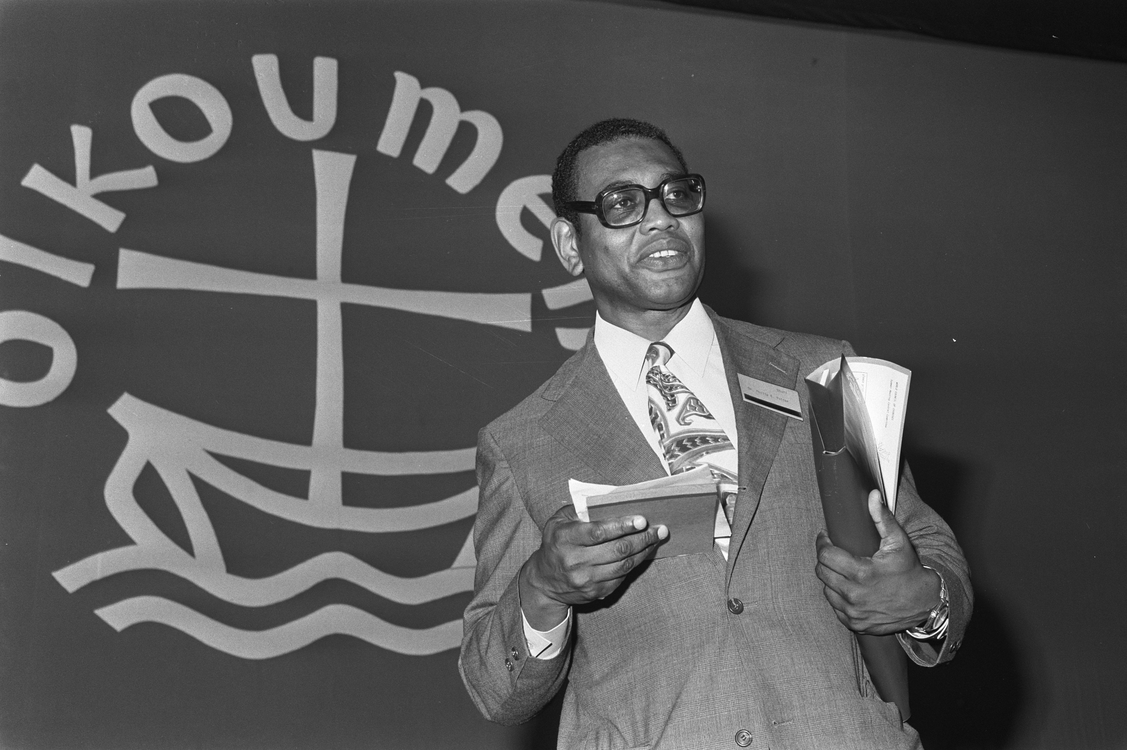 Collectie / Archief : Fotocollectie Anefo Reportage / Serie : [ onbekend ] Beschrijving : Congres Wereldraad van Kerken te Utrecht, dr. Philip A. Potter gekozen tot nieuwe voorzitter (kop) Datum : 16 augustus 1972 Locatie : Utrecht Trefwoorden : congressen, voorzitters Persoonsnaam : dr. Philip A. Potter Fotograaf : Mieremet, Rob / Anefo Auteursrechthebbende : Nationaal Archief Materiaalsoort : Negatief (zwart/wit) Nummer archiefinventaris : bekijk toegang 2.24.01.05 Bestanddeelnummer : 925-8113